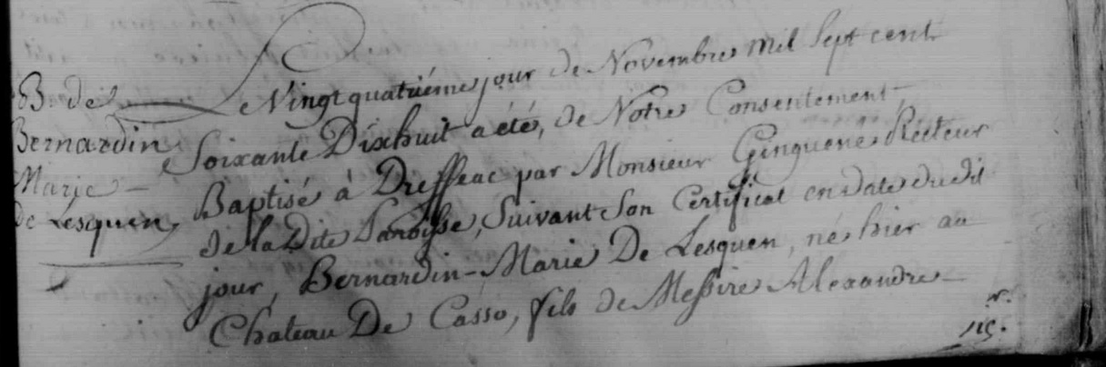 Acte de naissance de Bernardin de Lesquen au château de Casso, le 23 novembre 1778